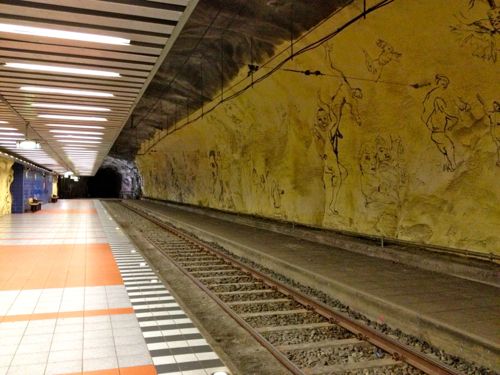 Hammarkullens underjordiska spårvagnsstation i Göteborg